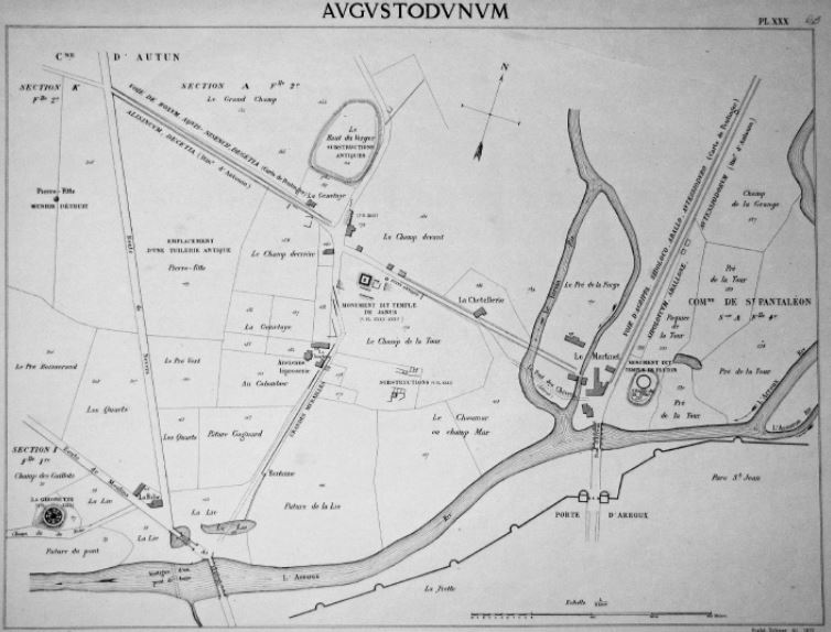 Plan des fouilles du temple de Janus levé en 1872 d'après des fouilles de 1871